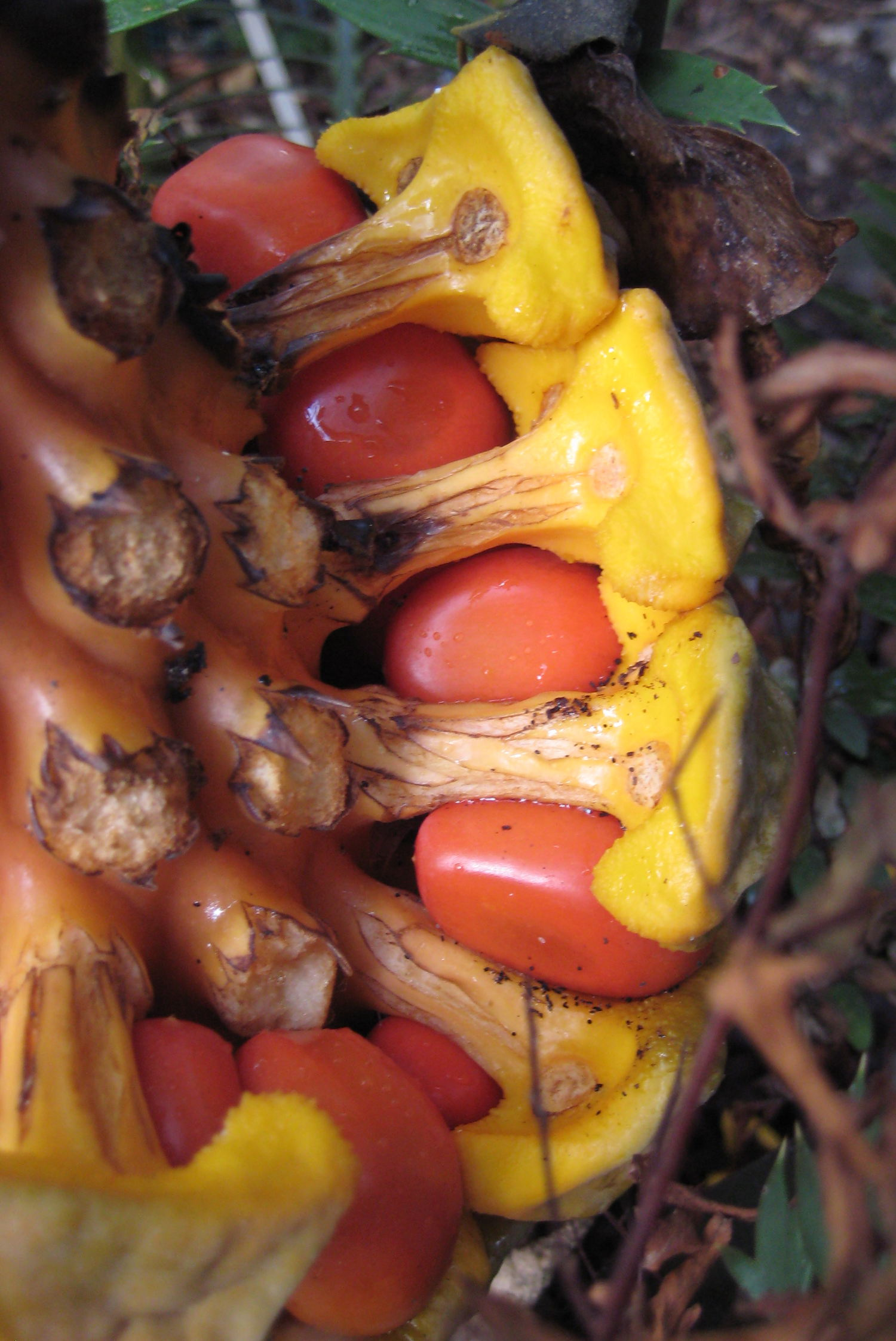 Encephalartos villosus im Botanischen Garten Dresden, seeds